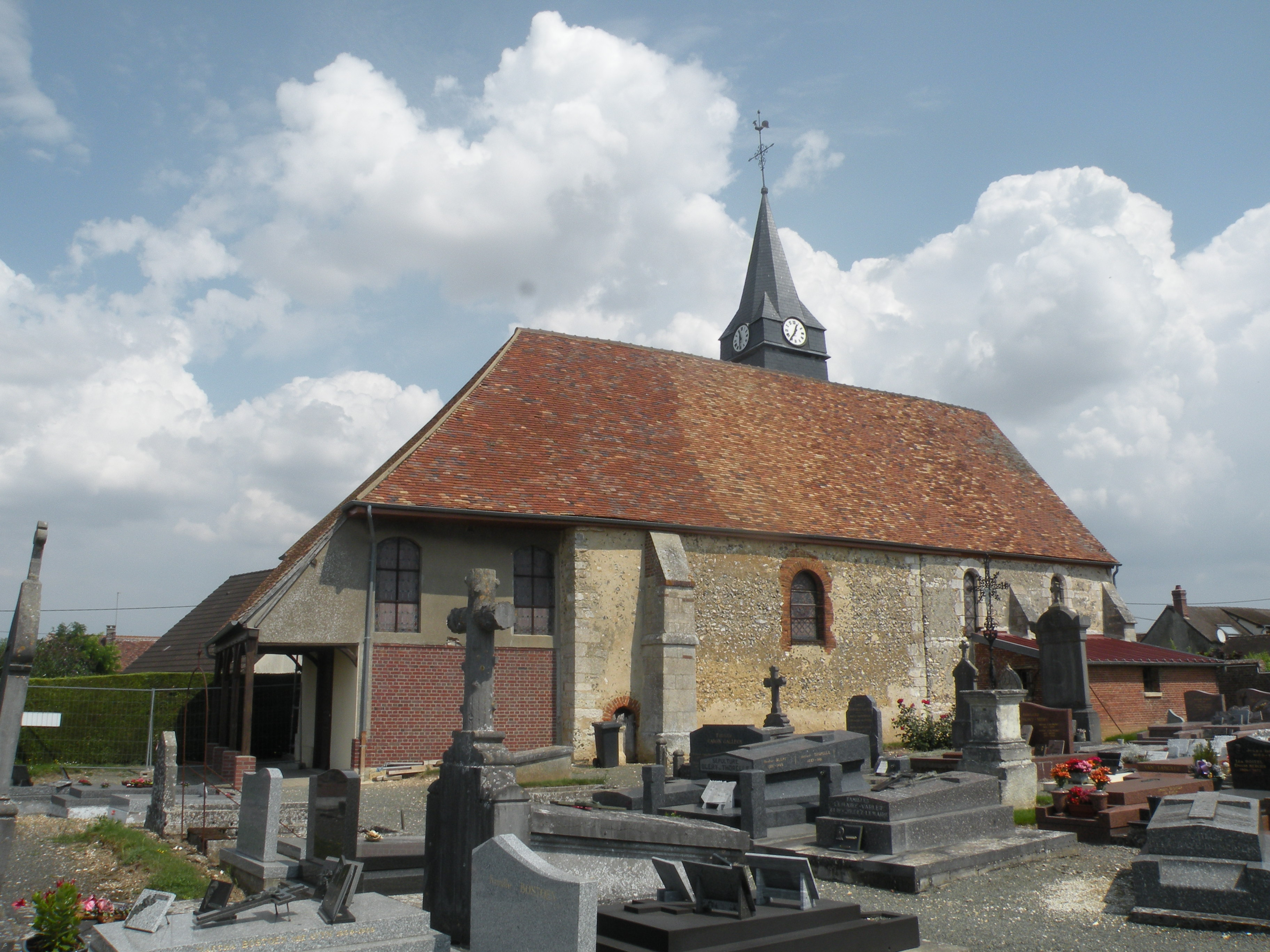 église Saint-Nocilas de Fouquerolles